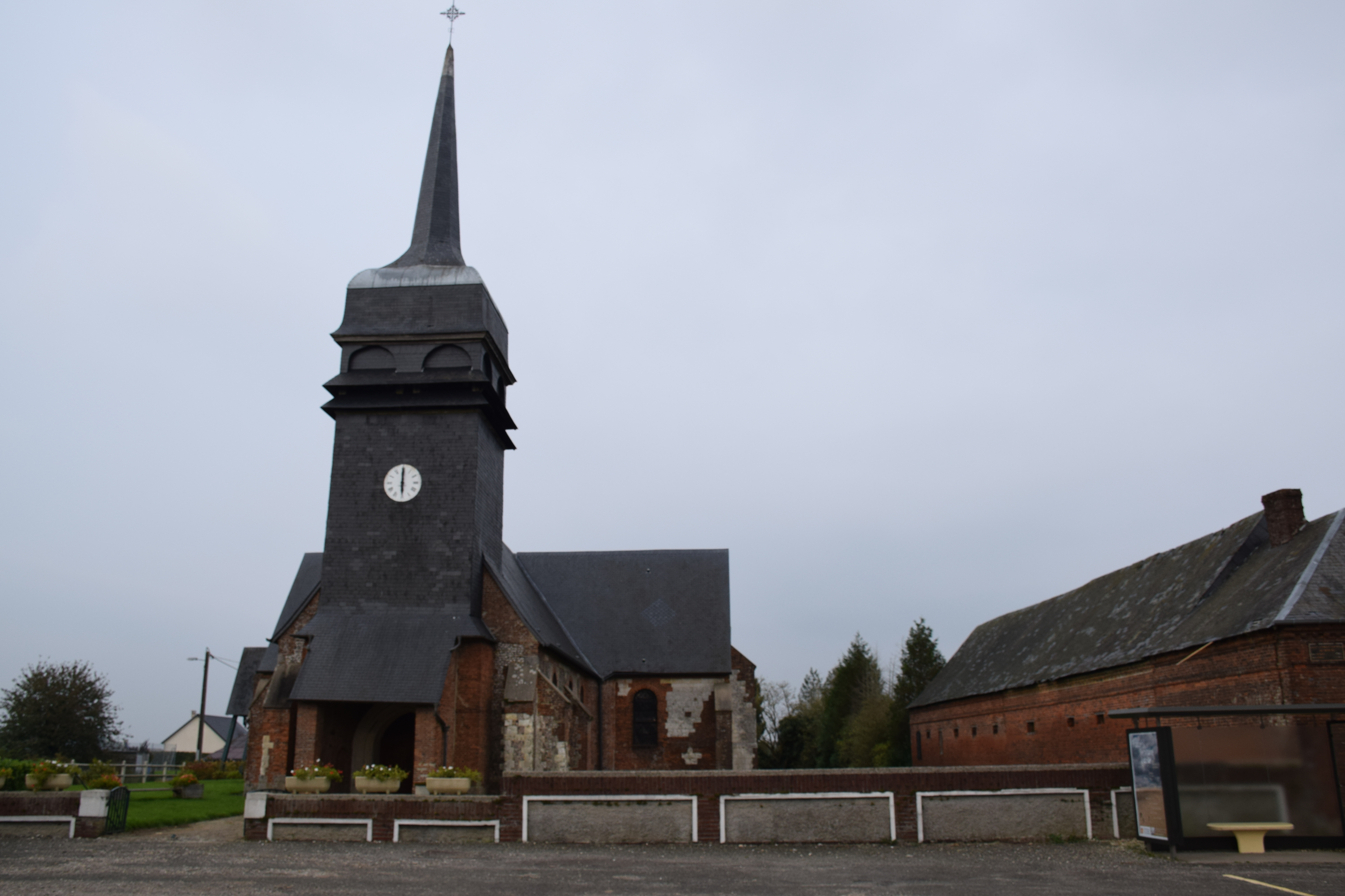 Eglise